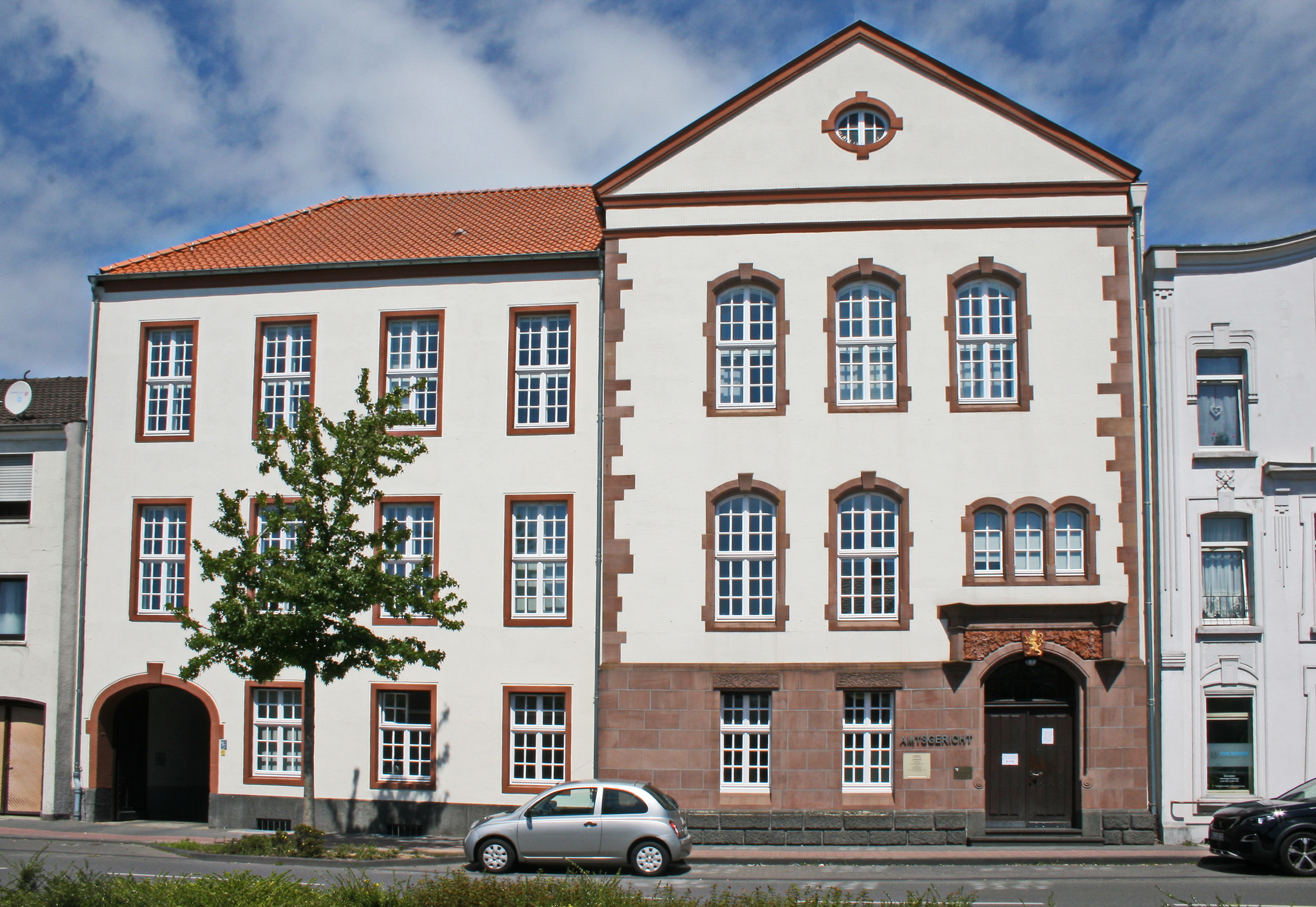 Amtsgericht Geldern in Geldern, Nordwall 51 This image shows a heritage building in Germany, located in the North Rhine-Westphalian city Geldern (no. GE10158).